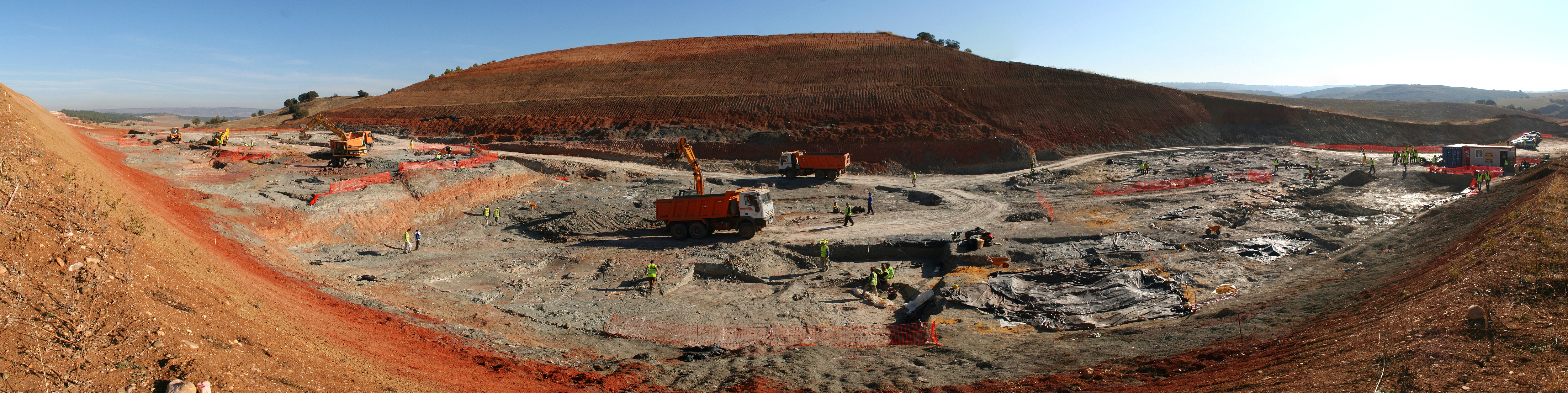 Panorámica de la excavación paleontológica de Lo Hueco, Fuentes, Cuenca, España